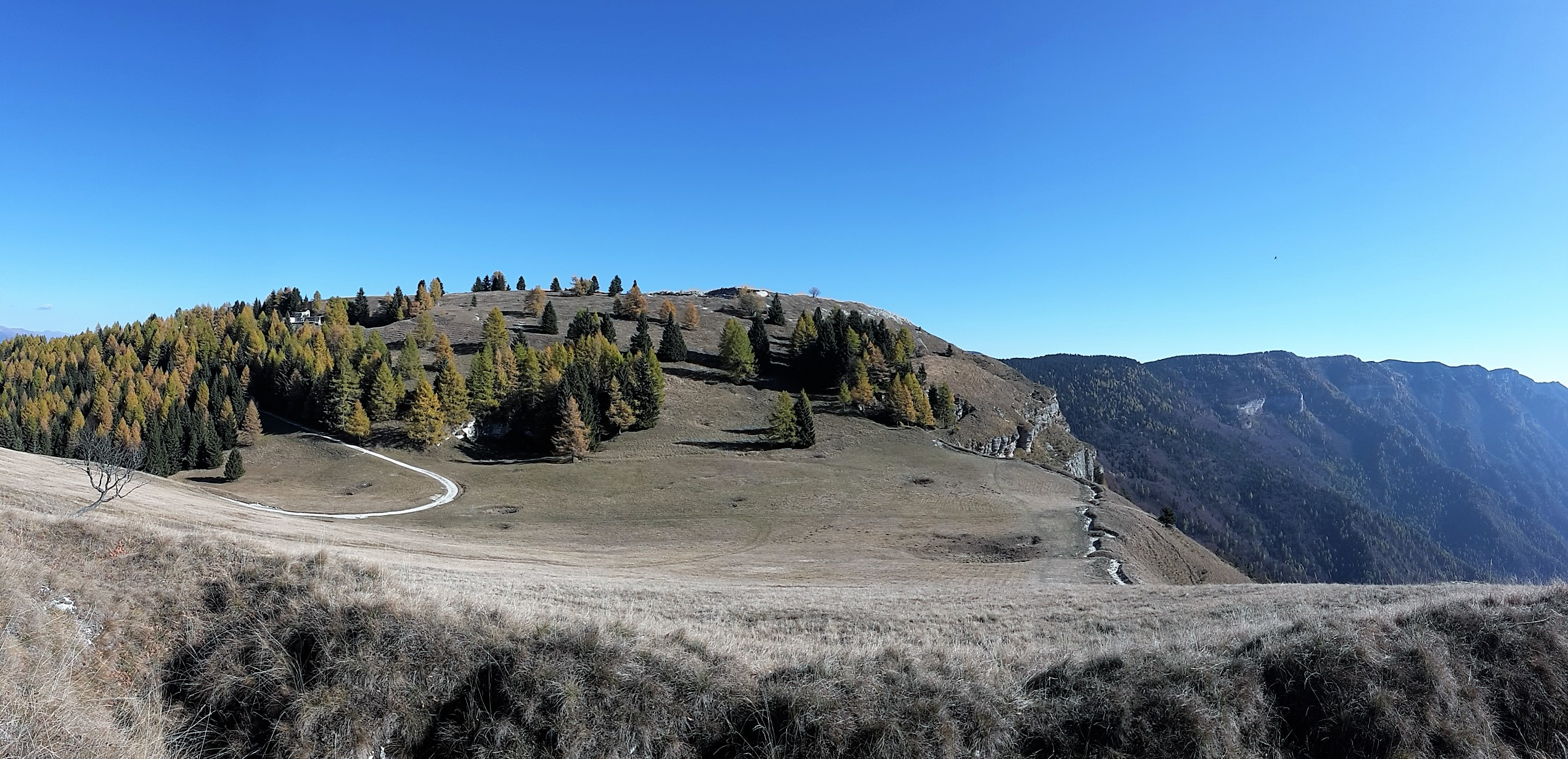 Forte Dosso delle Somme